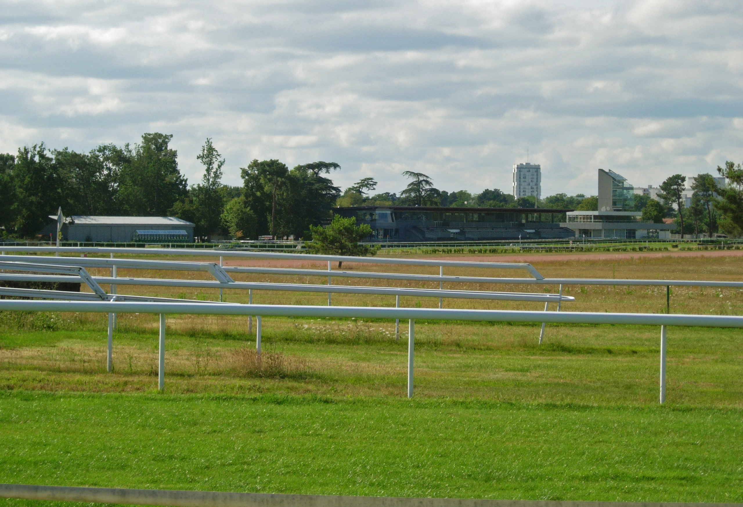 Vue de l'hippodrome du Bouscat, en Gironde.